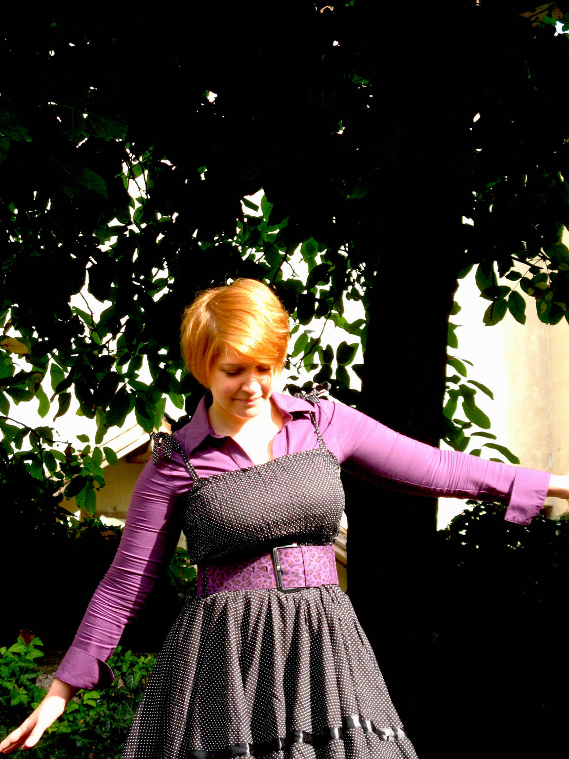 Autorenfoto Claudia Toman 2009